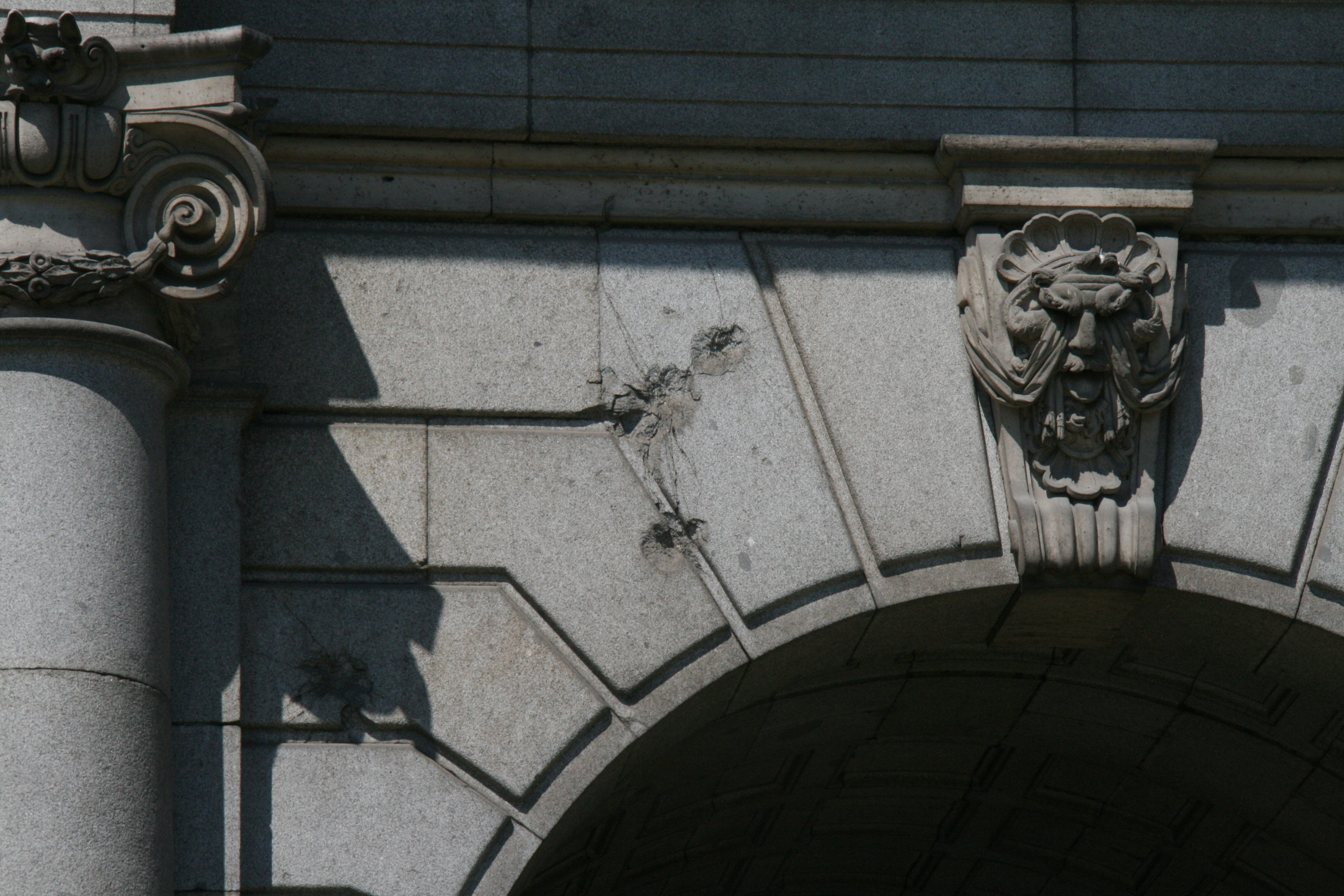 Impactos en la zona exterior de la Puerta de Alcalá -Madrid